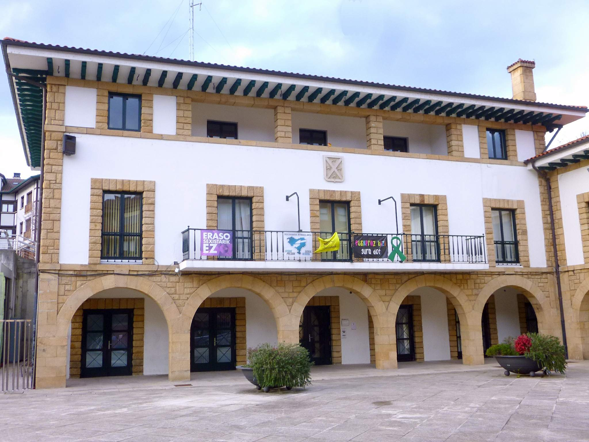 Ayuntamiento de Igorre (Bizkaia)